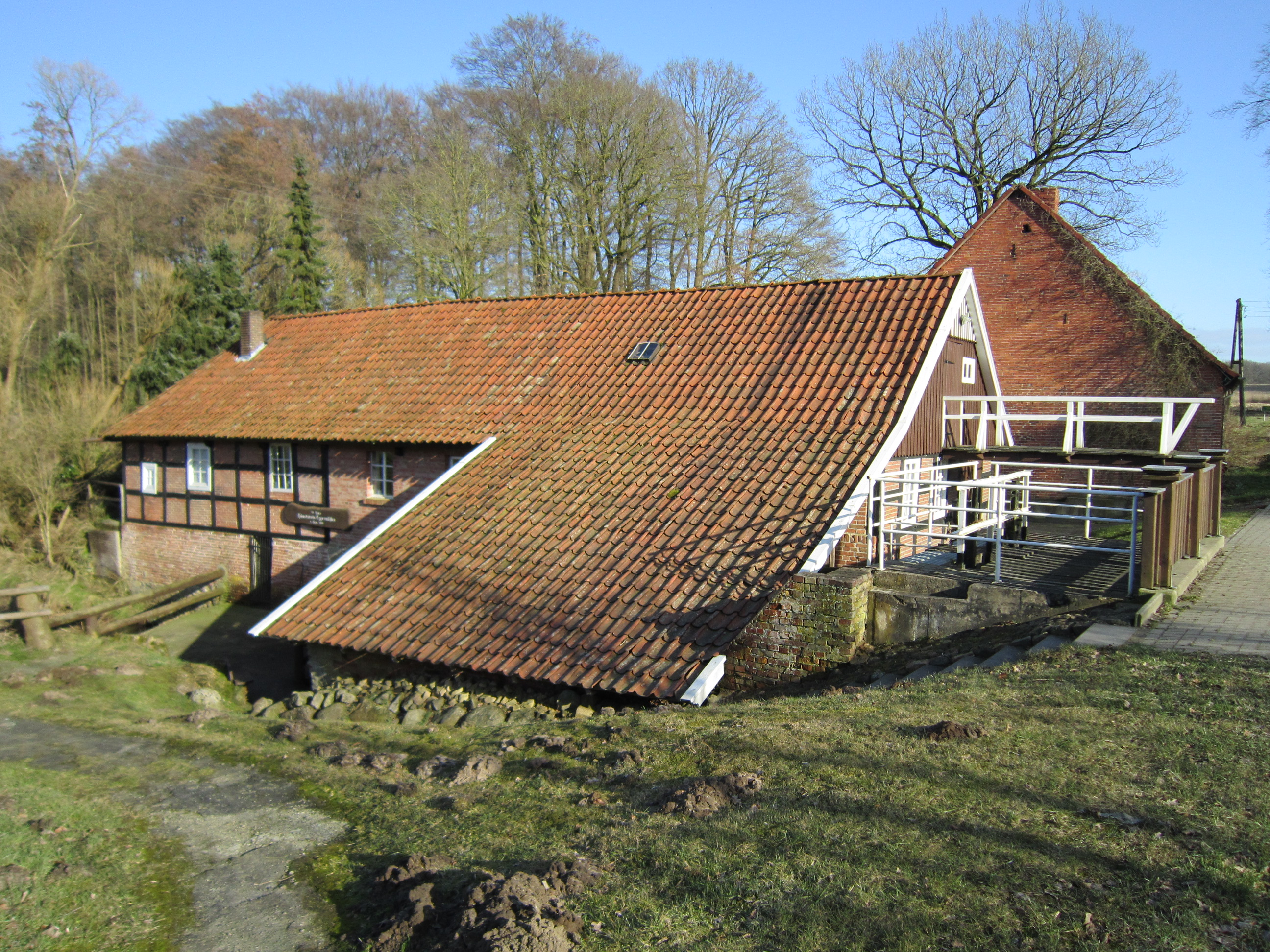 Wassermühle in Eggermühlen (Landkreis Osnabrück)